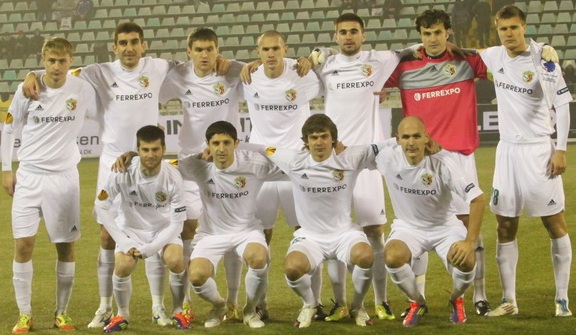 Ворскла (Полтава) перед матчем з Копенгагеном в Лізі Європи 2011/2012